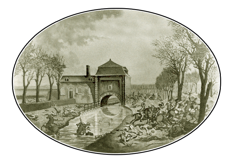 ferme de la marmite 1792